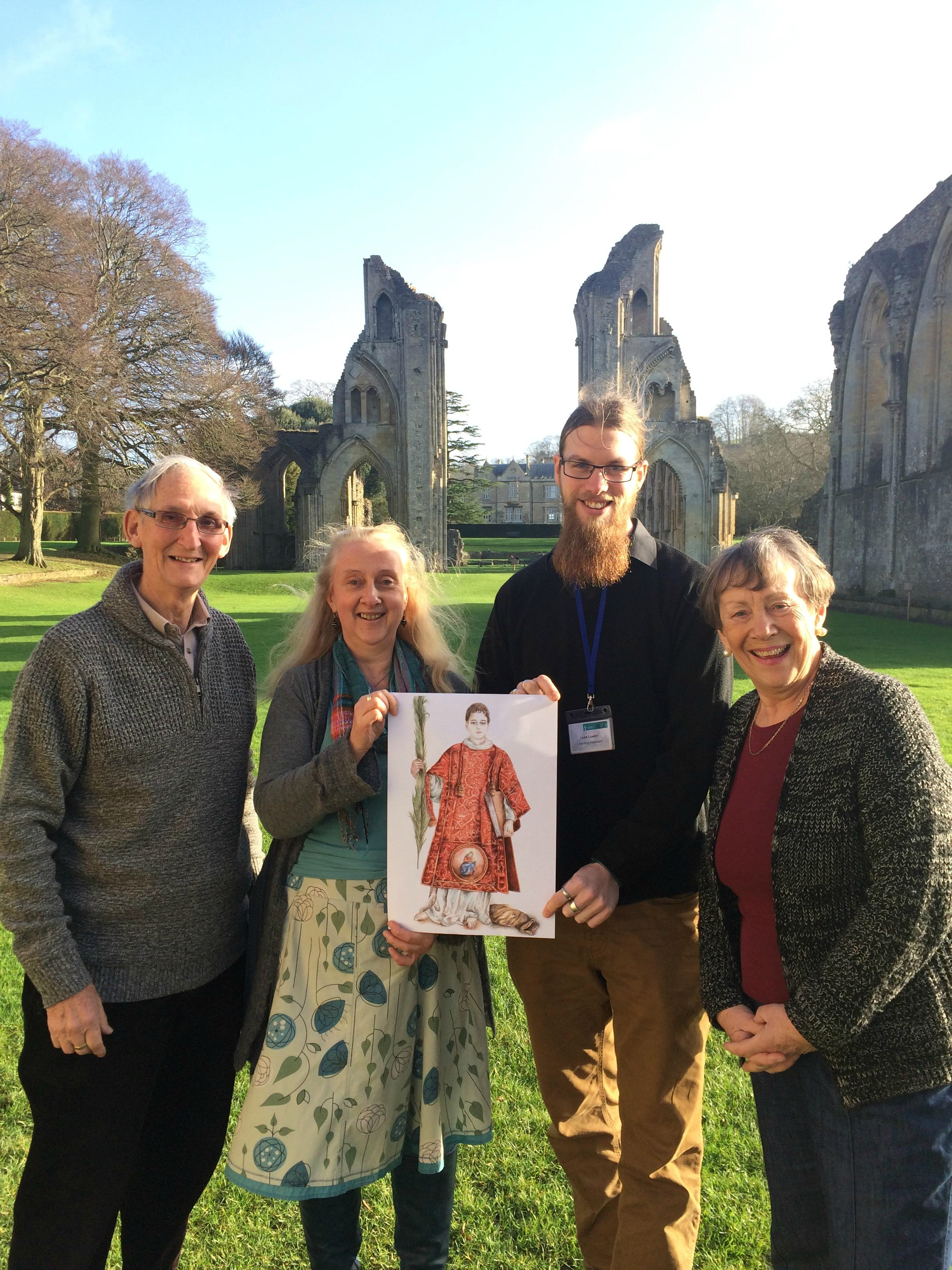 Glastonbury (Inghilterra), Abbazia di Glastonbury: il team "Glastonbury Abbey" con l'icona di San Cesario diacono e martire